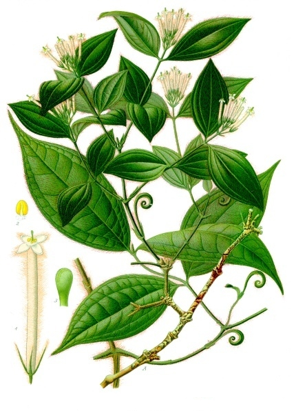 Gift-Brechnuss. A Blatt und Blütenzweig, nat. Gr. 1 Blüte, vergrössert; 2 Staubblatt, vergrössert; 3 Narbe, vergrössert.